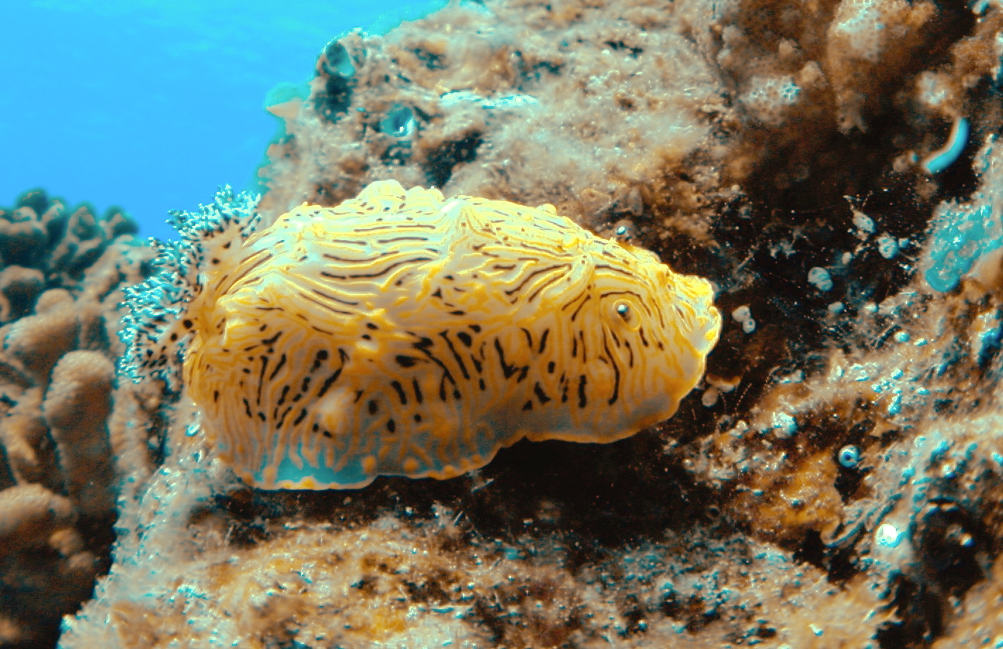 Halgerda willeyi in Hahajima Ogasawara Tokyo, Japan